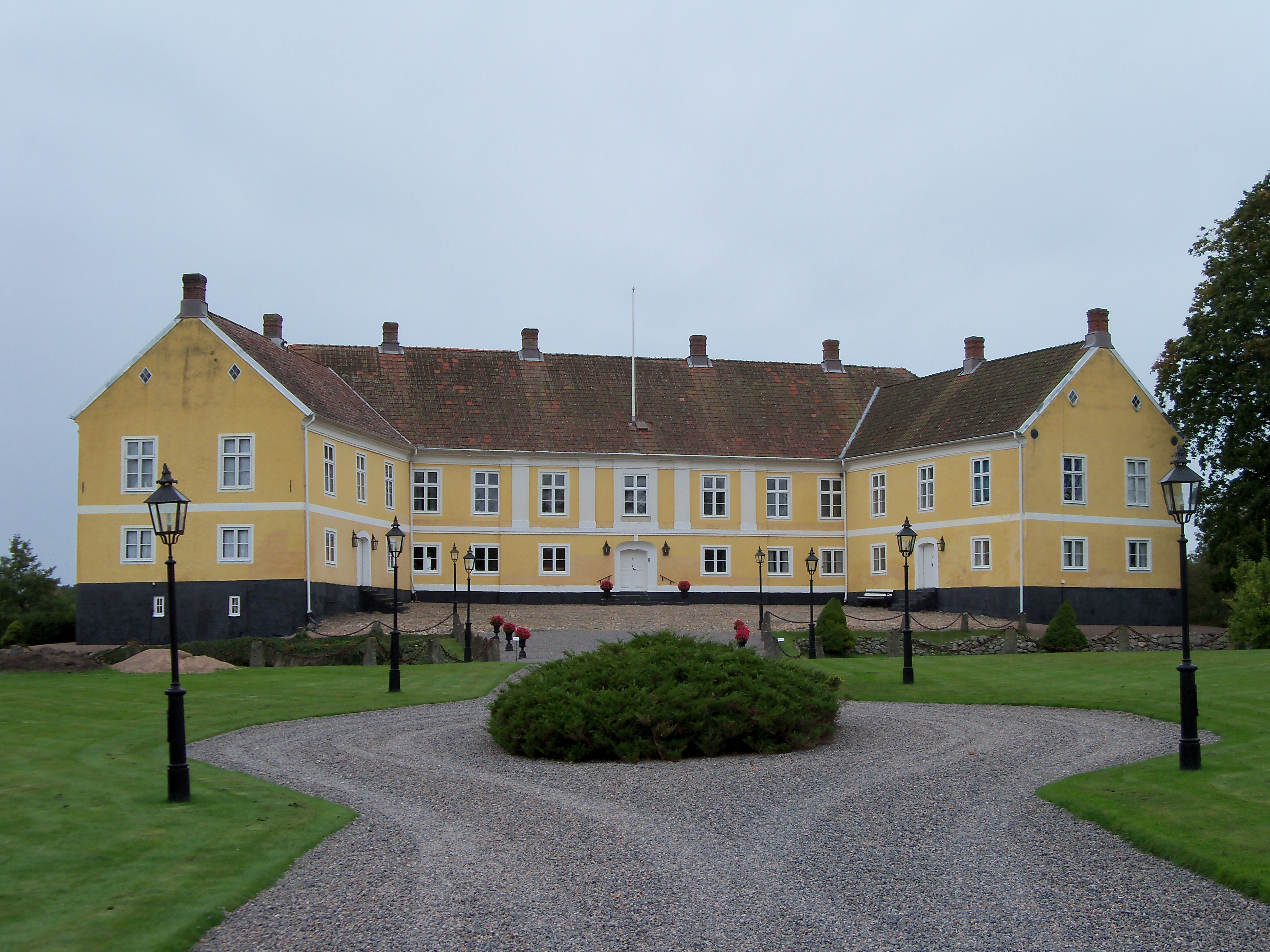 Vallens slott